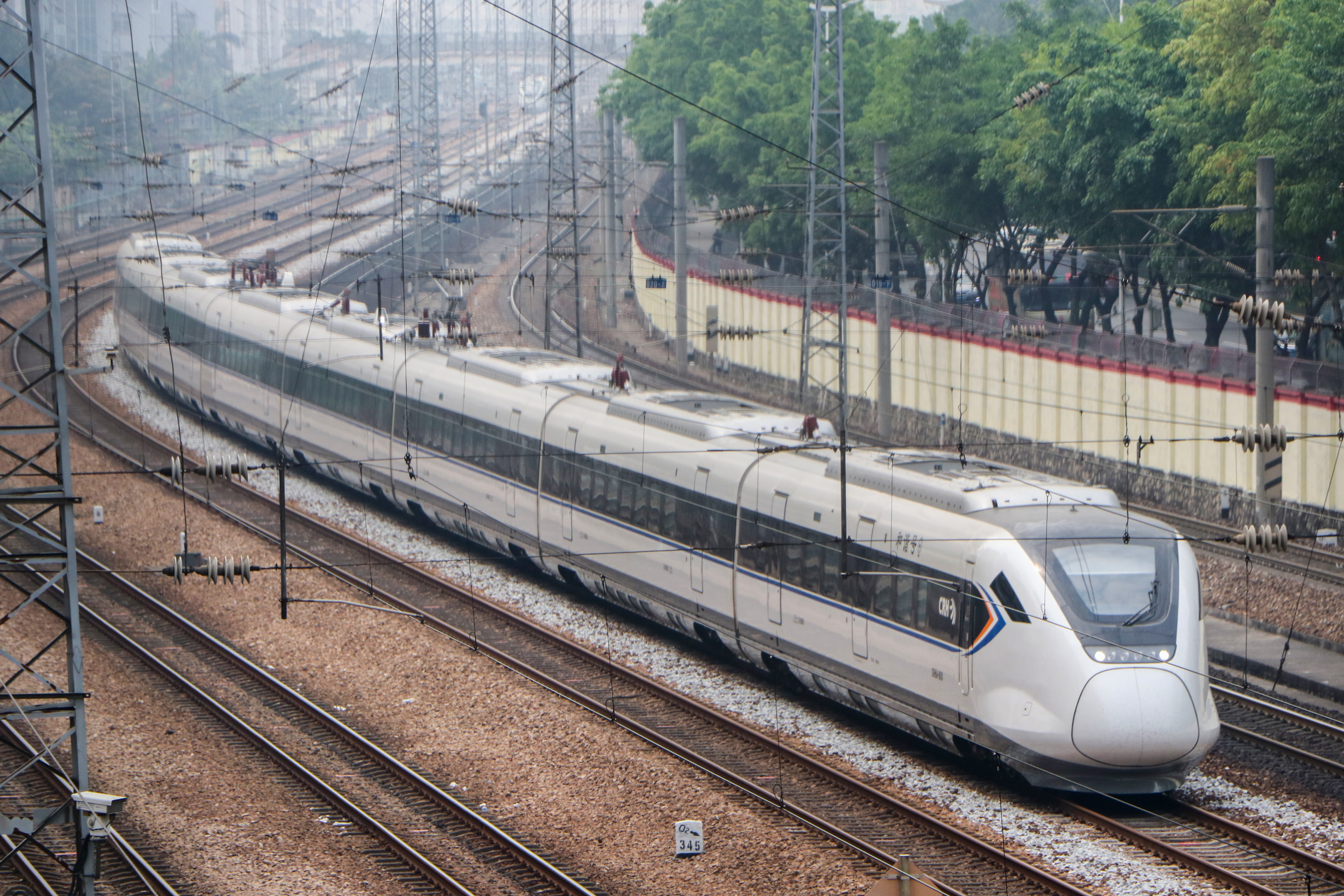 CRH6A运行于广深铁路